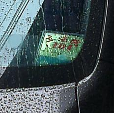 疑似中華民國立法院發放的停車識別證，也可能是偽造的。